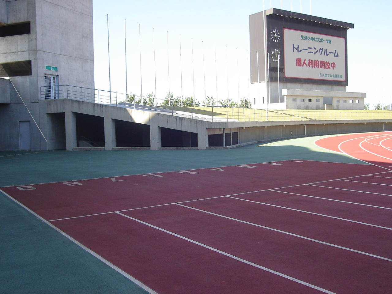 香川県立丸亀競技場。 - 日本国香川県丸亀市にある競技場。